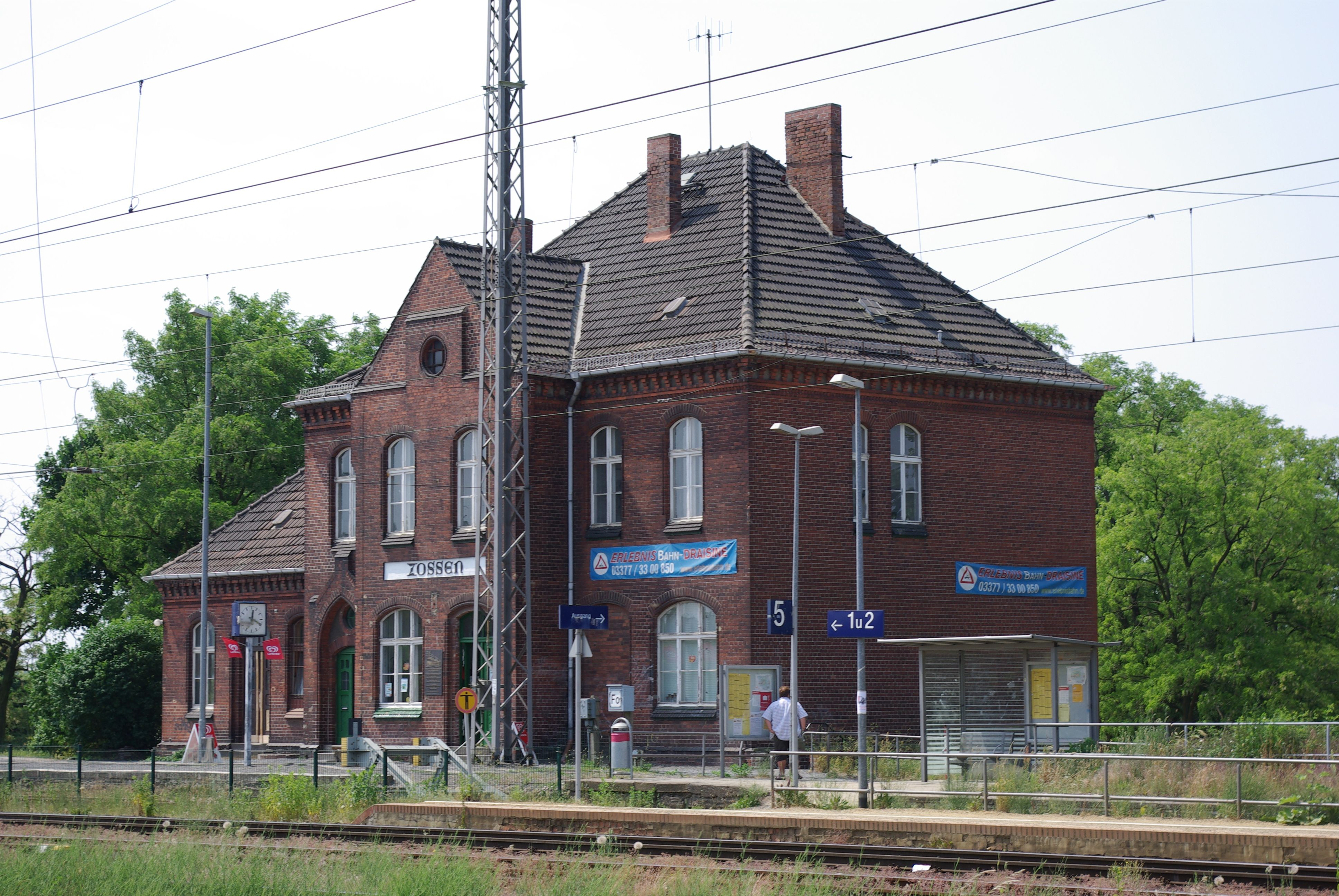 Zossen, Brandenburg, Bahnhof der Könglich-Preußischen-Militäreisenbahn (KME), der Bahnhof steht unter Denkmalschutz